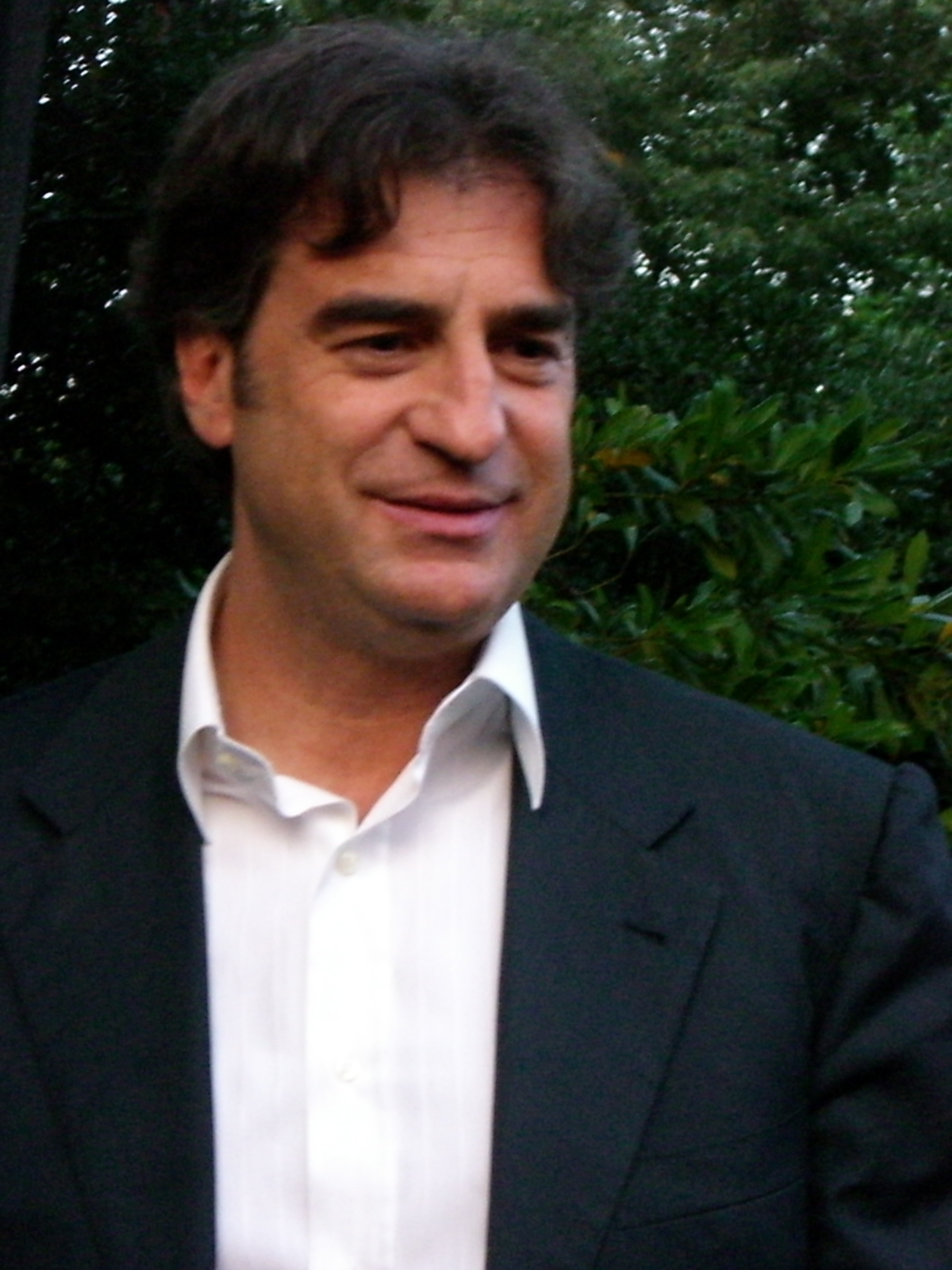 Max Tortora